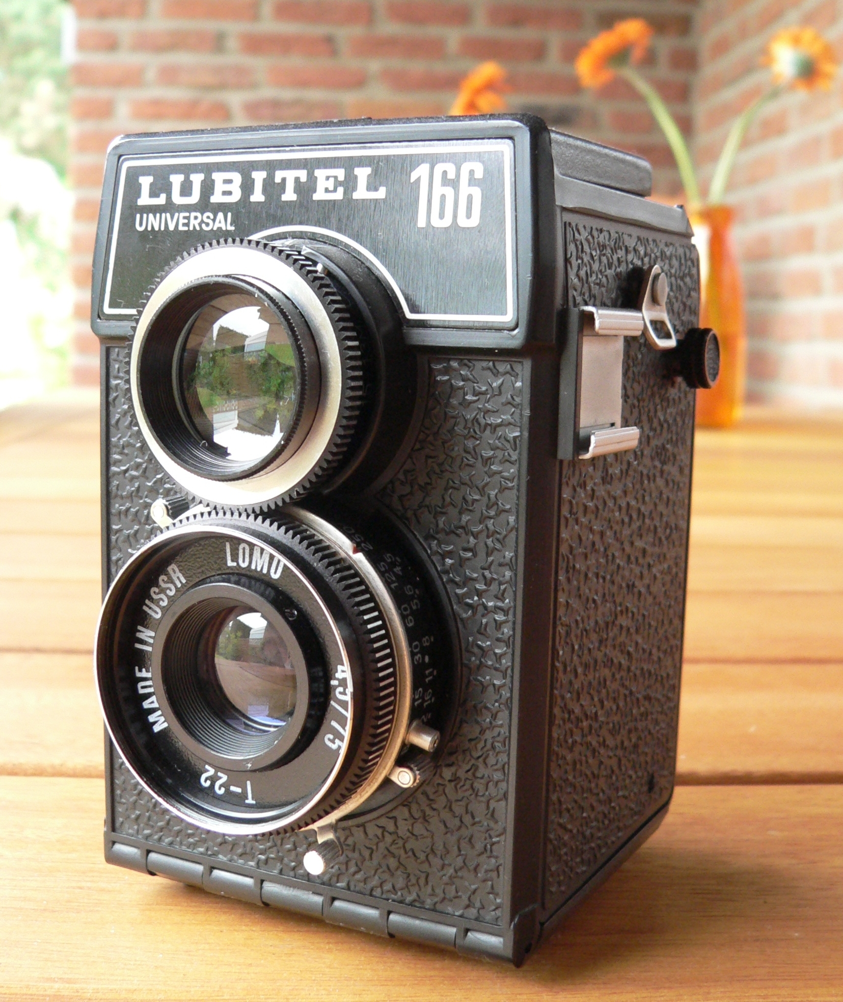 Lubitel 166 U, Foto selbst erstellt